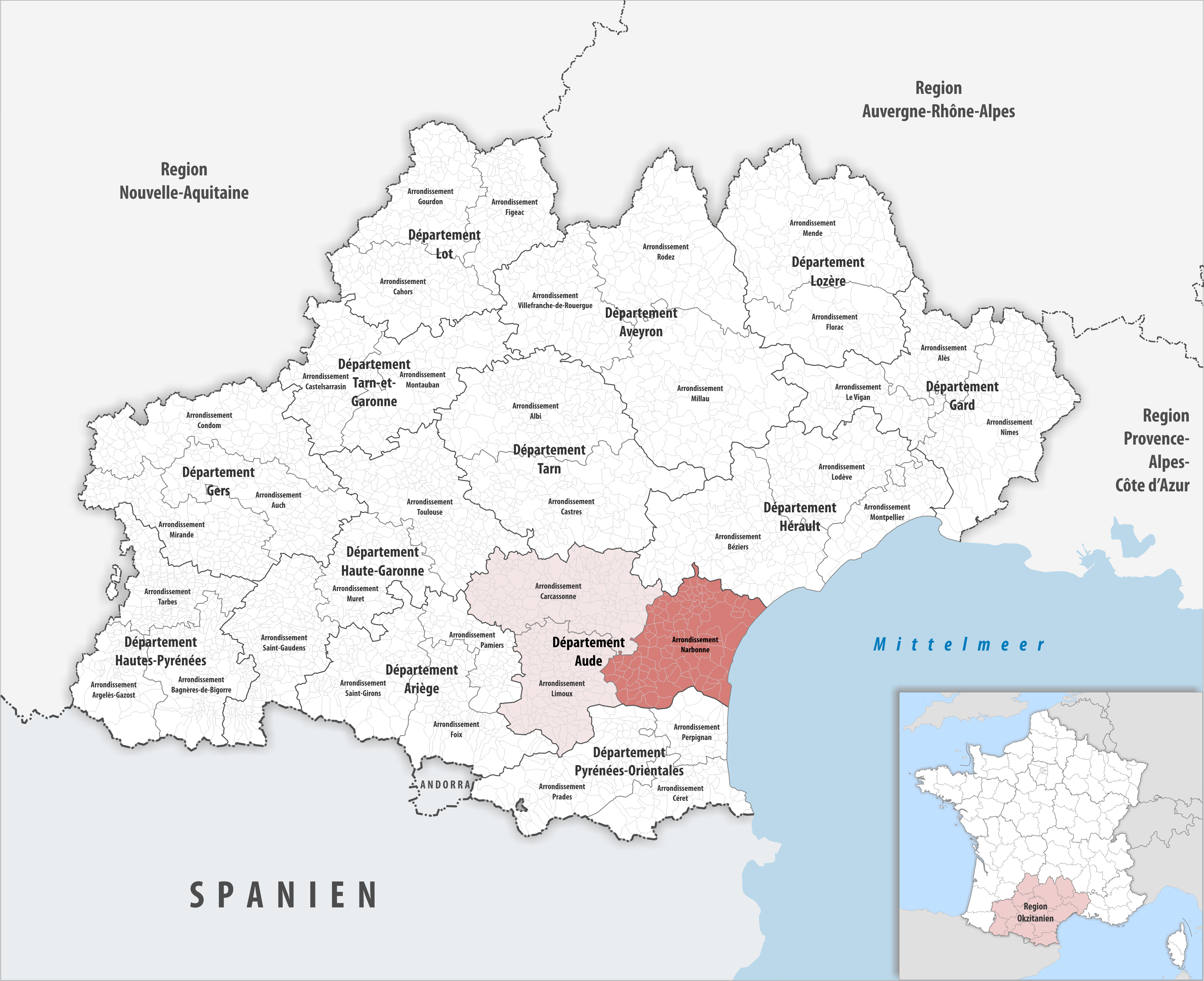 Lage des Arrondissements Narbonne